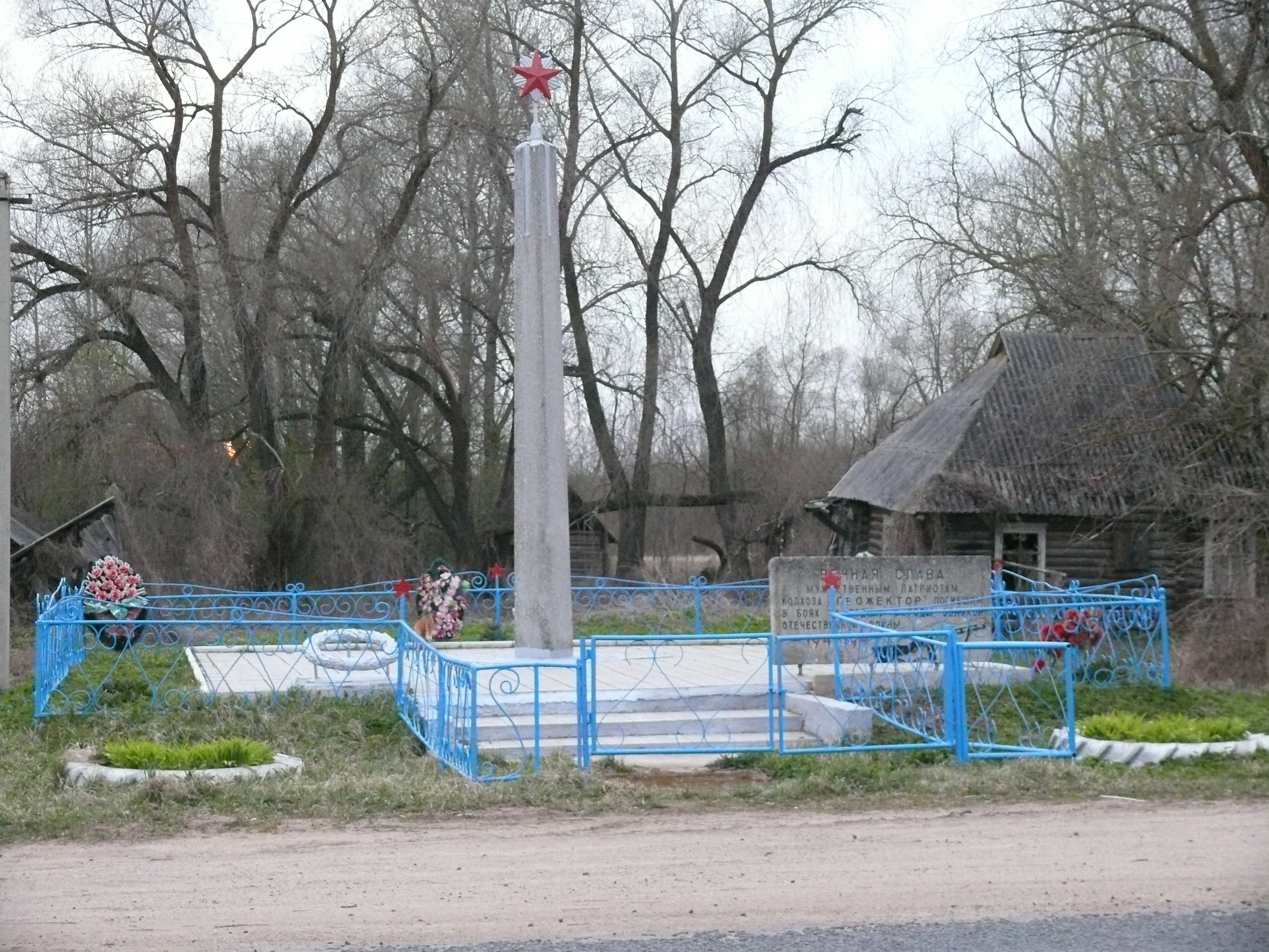 Воинское захоронение в деревне Ашево Бежаницкого района Псковской области